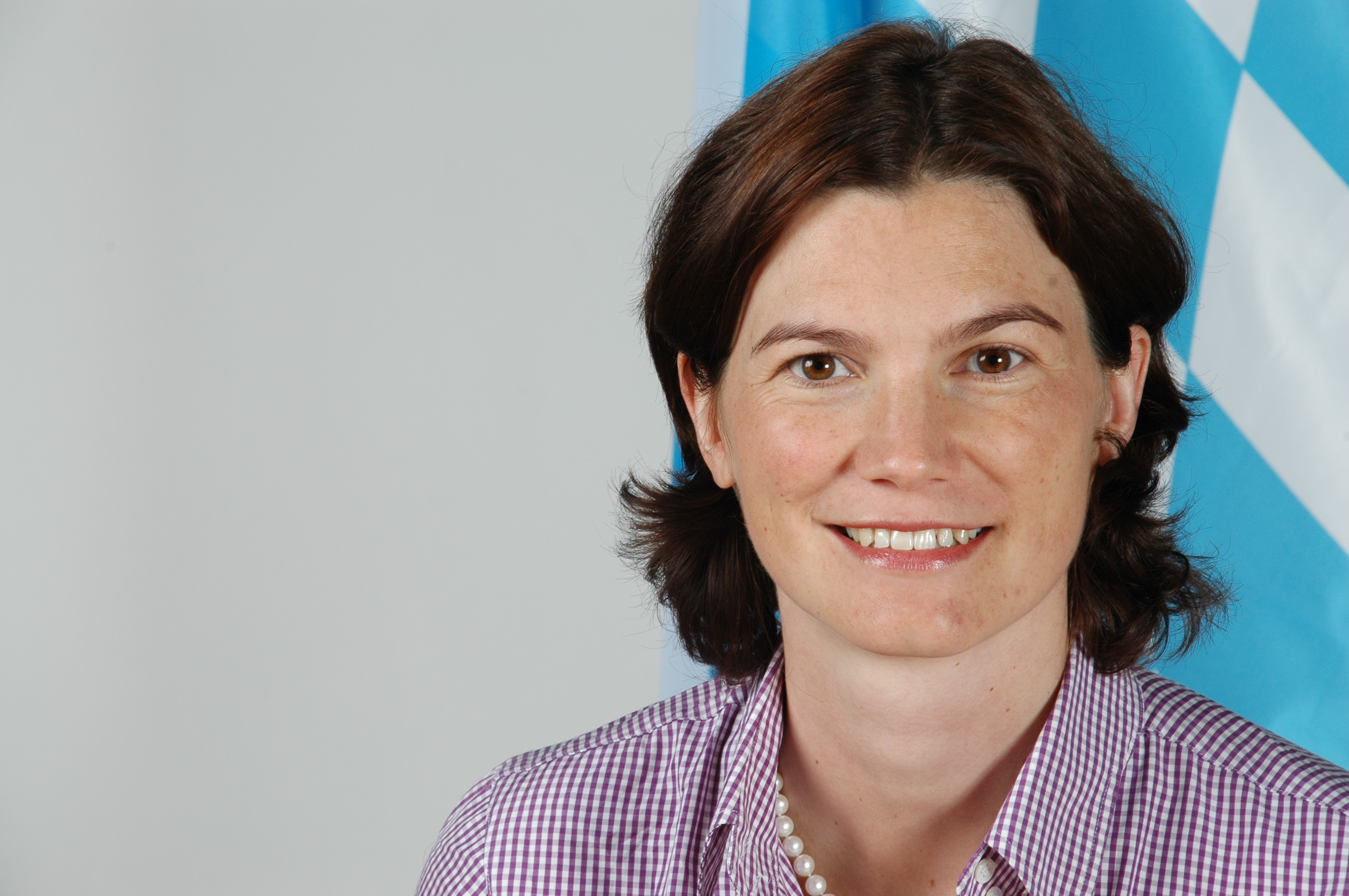 Tanja Schweiger, MdL, Juli 2012, Landtagsprojekt Bayern 2012.